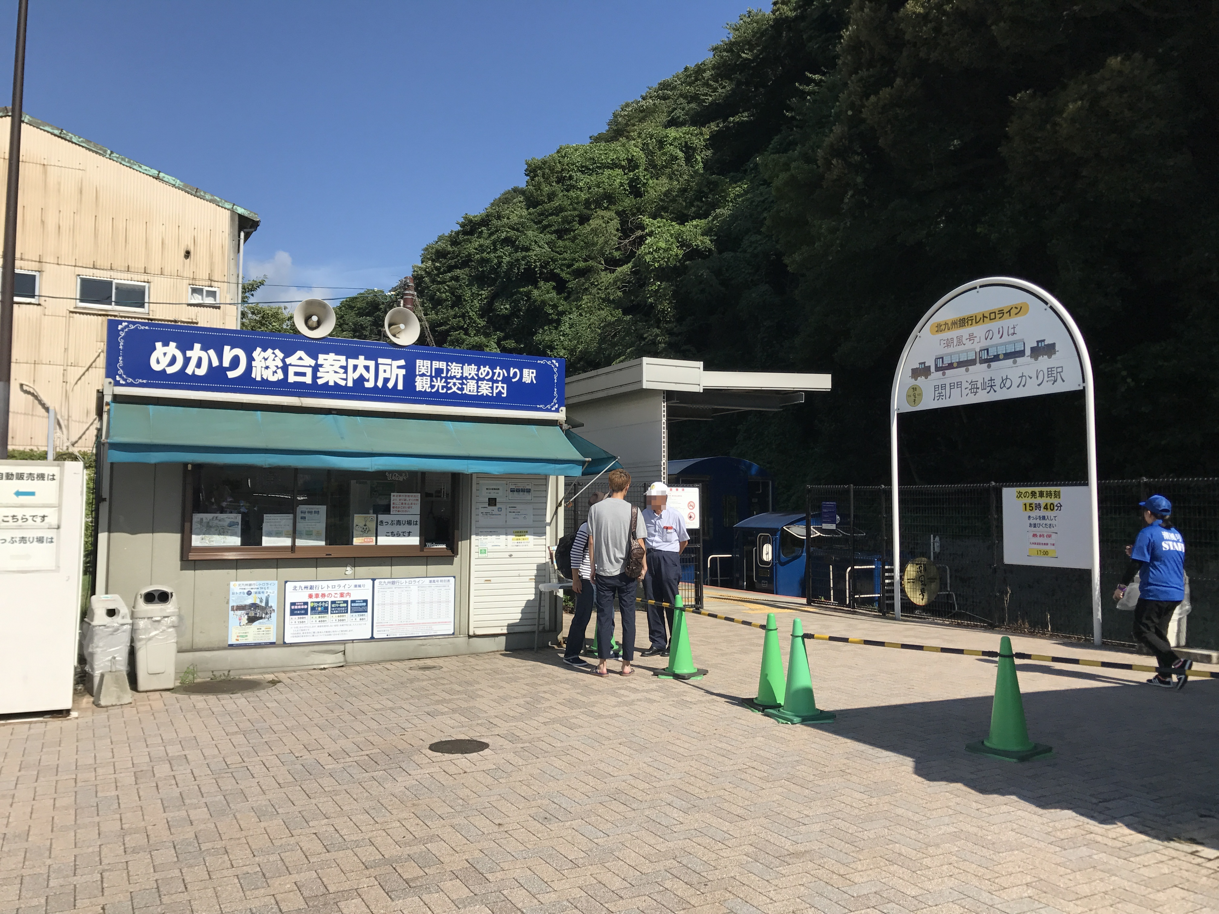 関門海峡めかり駅駅舎